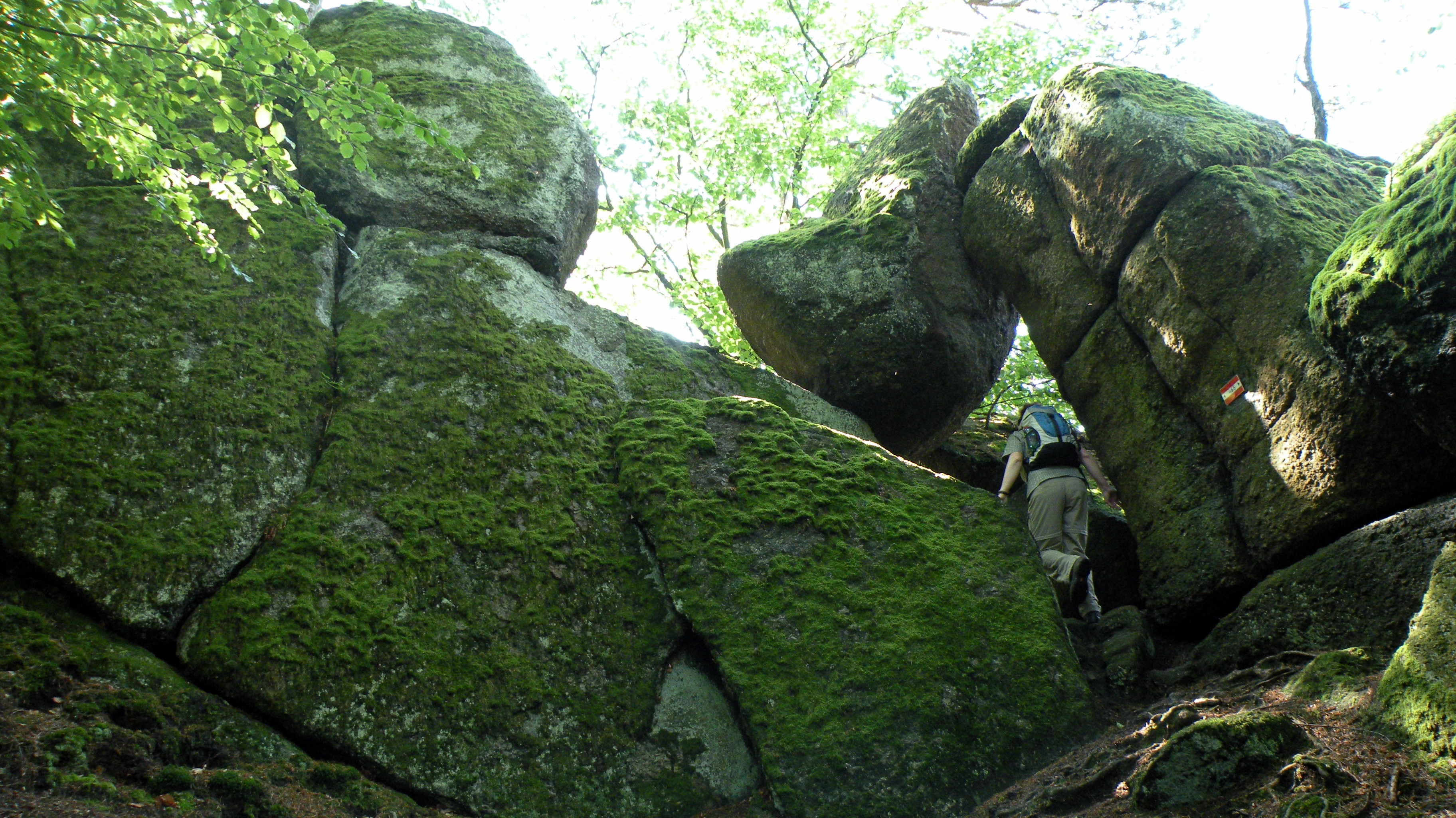 Weg durch die Steine, Matras-Steig von der Donau bis zum Brandstetterkogel in der Gemeinde Neustadtl an der Donau im Strudengau im Bezirk Amstetten in Niederösterreich